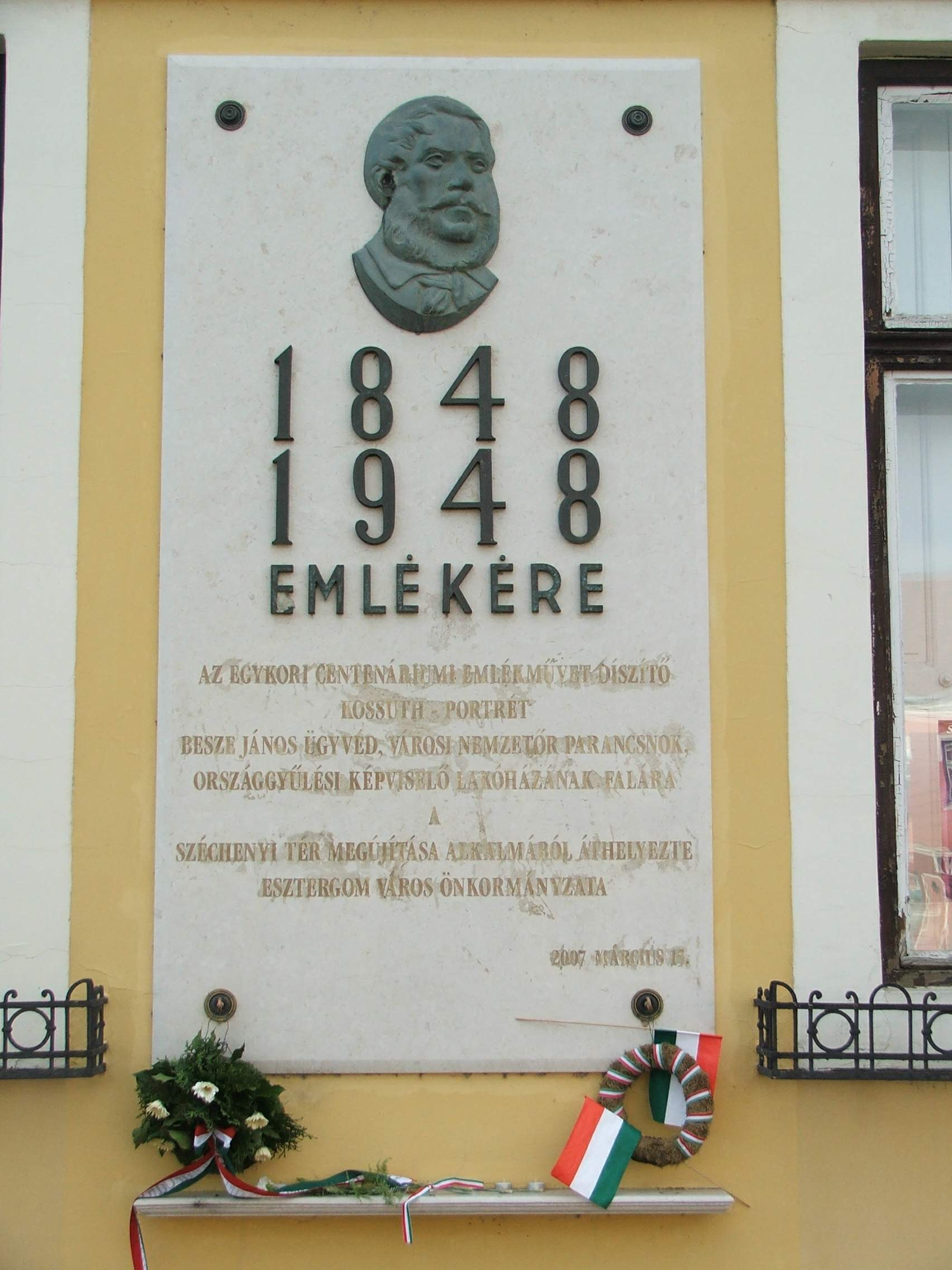 1848-as emléktábla (Besze János városi nemzetőr parancsnok házának) falán Széchenyi tér 10.